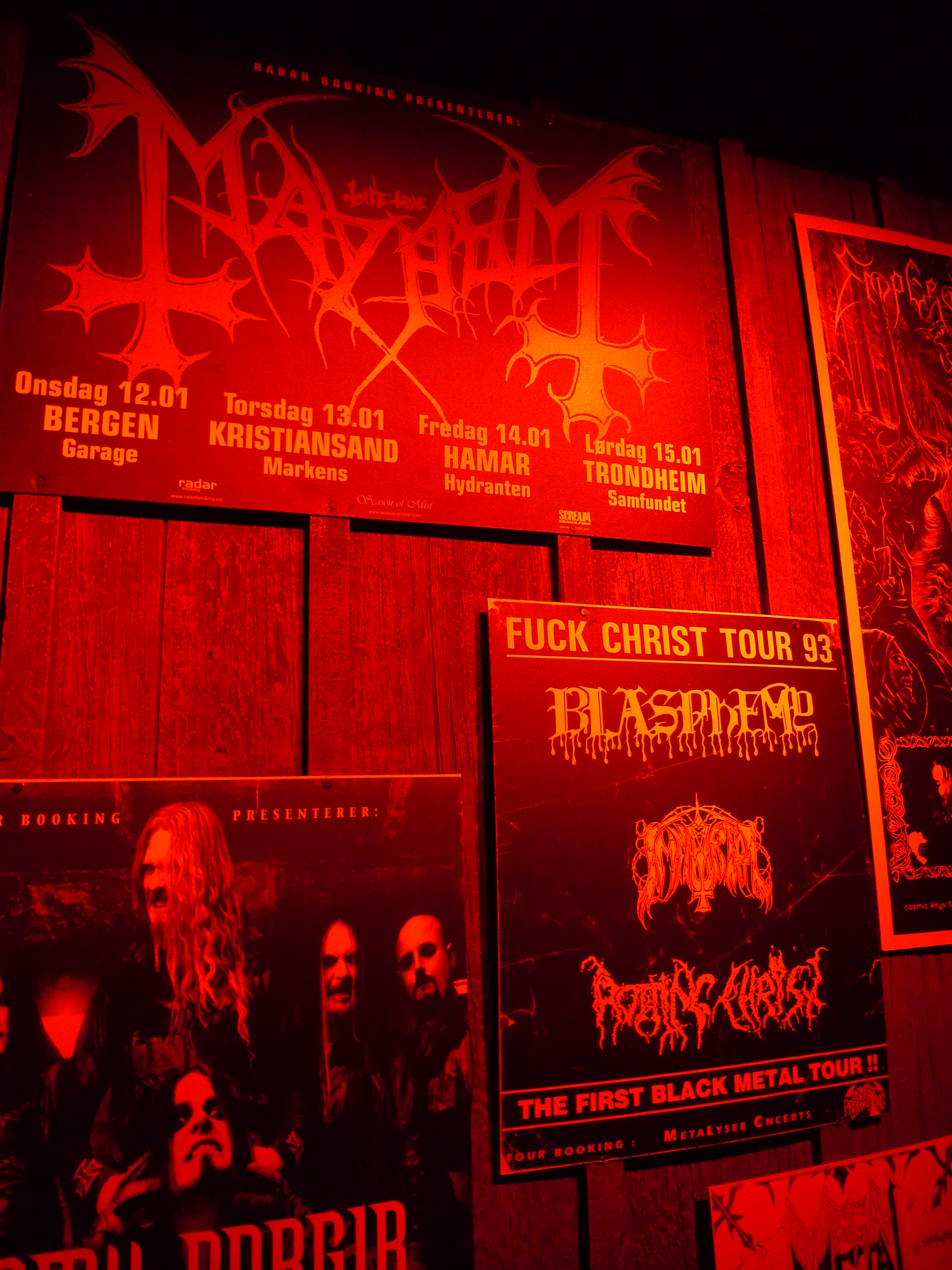 Rockheim museum, Trondheim, Norway.